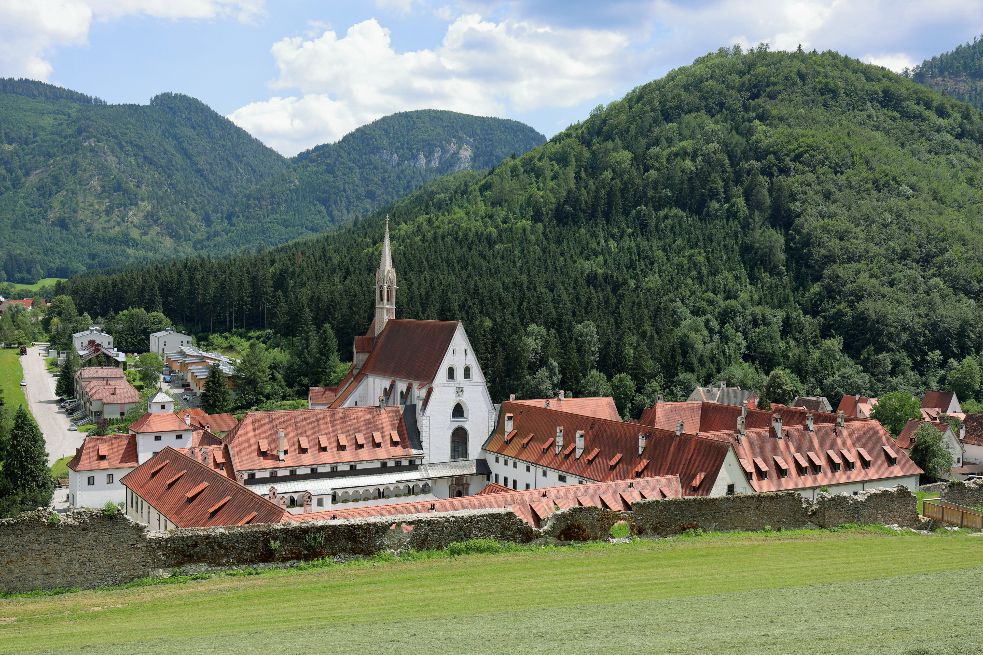 Nordwestansicht des Zentrums vom ehemaligen Kartäuserkloster Marienthron in der niederösterreichischen Marktgemeinde Gaming.Links der Prälatenhof, rechts das Dach des Bibliothekshofes und dazwischen die Klosterkirche. Die größte Kartause der deutschen Ordensprovinz wurde ab 1332 errichtet und 1782 unter Kaiser Joseph II. aufgelöst.